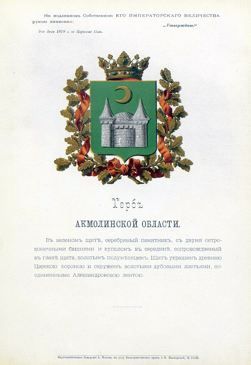 Official Russian Empire coat of arms Akmolinsk Oblast. Герб Российской Империи Акмолинской области с официальным описанием в Гербовнике Министерства внутренних дел Российской Империи издательства Бенке. Утверждён Императором Всероссийским Александром Вторым в 1878 году.